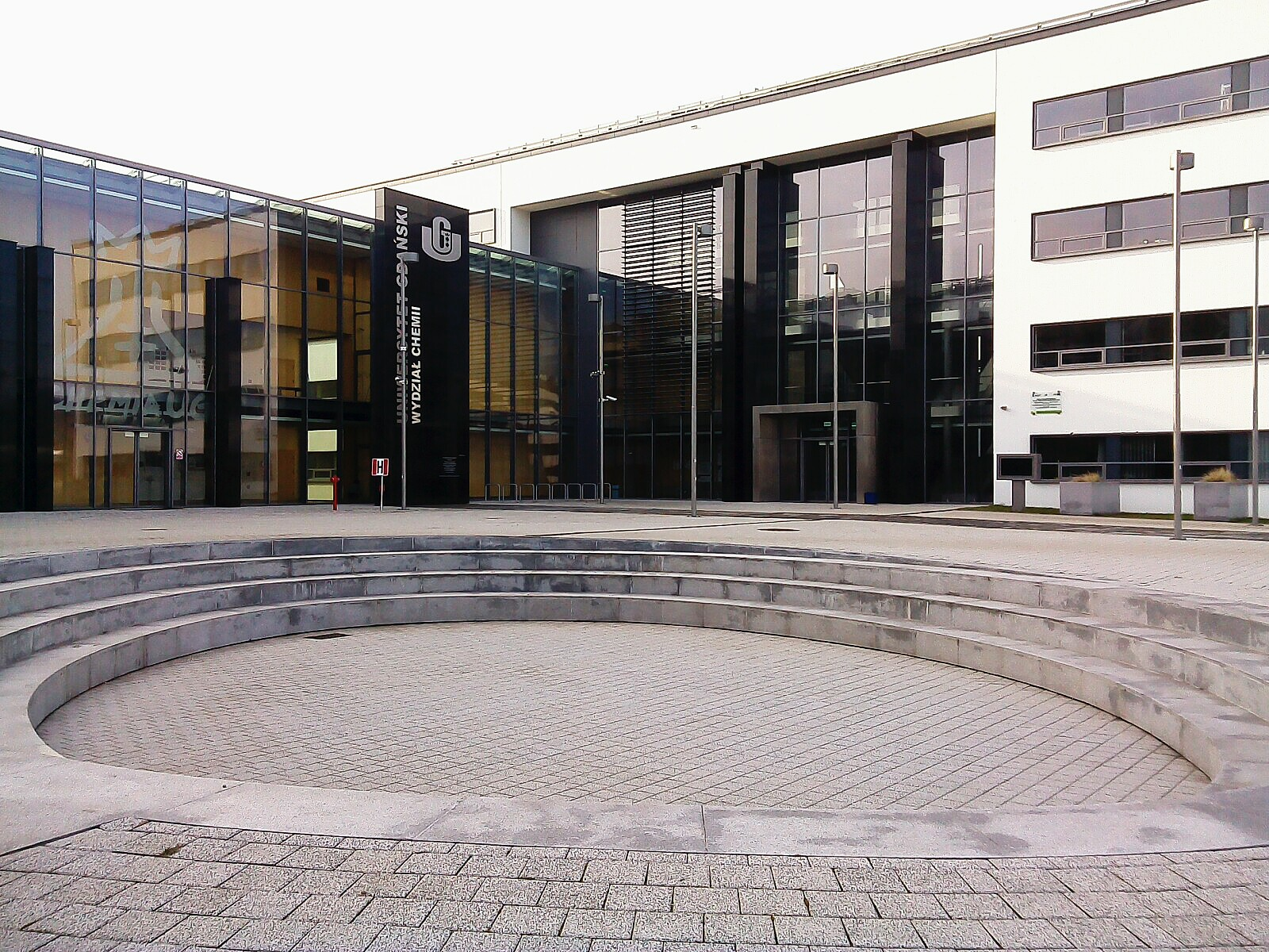 Uniwersytet Gdański - wydział chemii